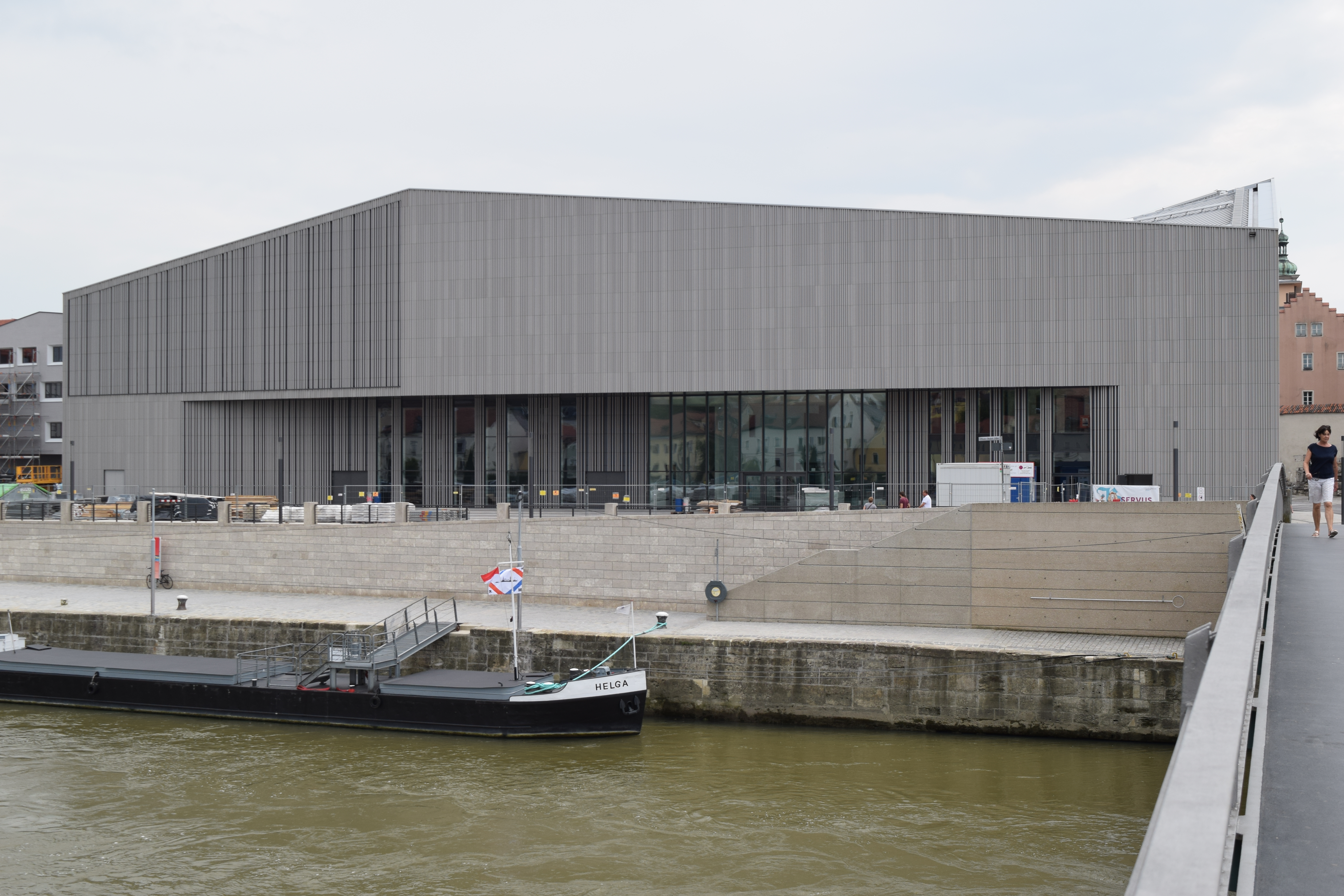 Das umstrittene Design war Grund für viele Debatten. Hier von der Donau aus gesehen. Fotografiert im Juni 2018 von der Donau aus.